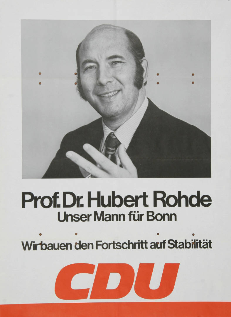 Prof. Dr. Hubert Rohde Unser Mann für Bonn SloganAbbildung:PorträtfotoPlakatart:Kandidaten-/Personenplakat mit PorträtObjekt-Signatur:10-001: 1694Bestand:Plakate zu Bundestagswahlen (10-001)GliederungBestand10-18:Plakate zu Bundestagswahlen (10-001) » Die 7. Bundestagswahl am 19. November 1972 » CDU » Mit PorträtfotoLizenz:KAS/ACDP 10-001: 1694 CC-BY-SA 3.0 DE